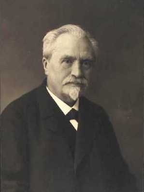 Martin Clarentius Gertz (1844-1929), klassisk filolog